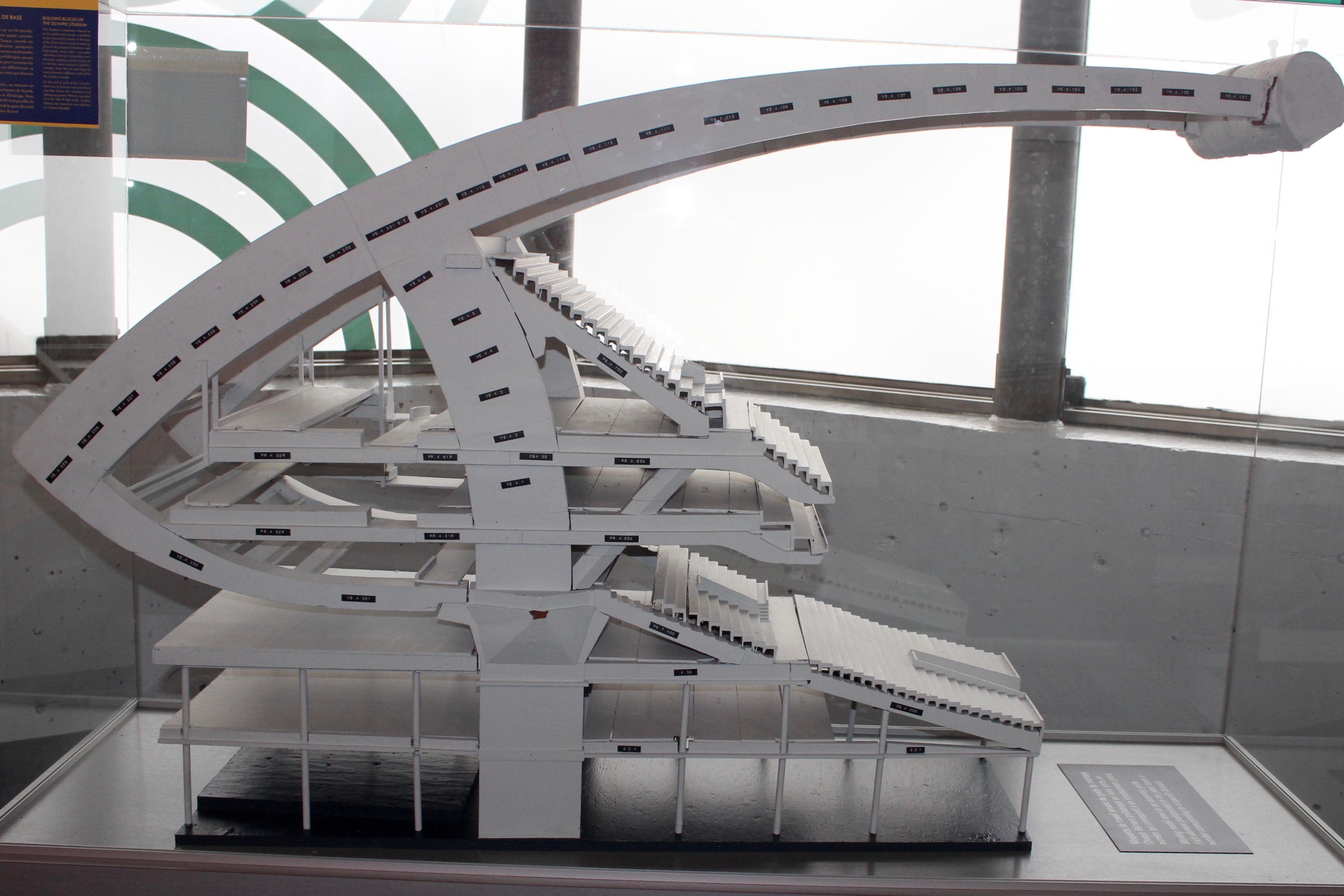 Maquette du stade olympique représentant une section de la structure entre deux consoles.